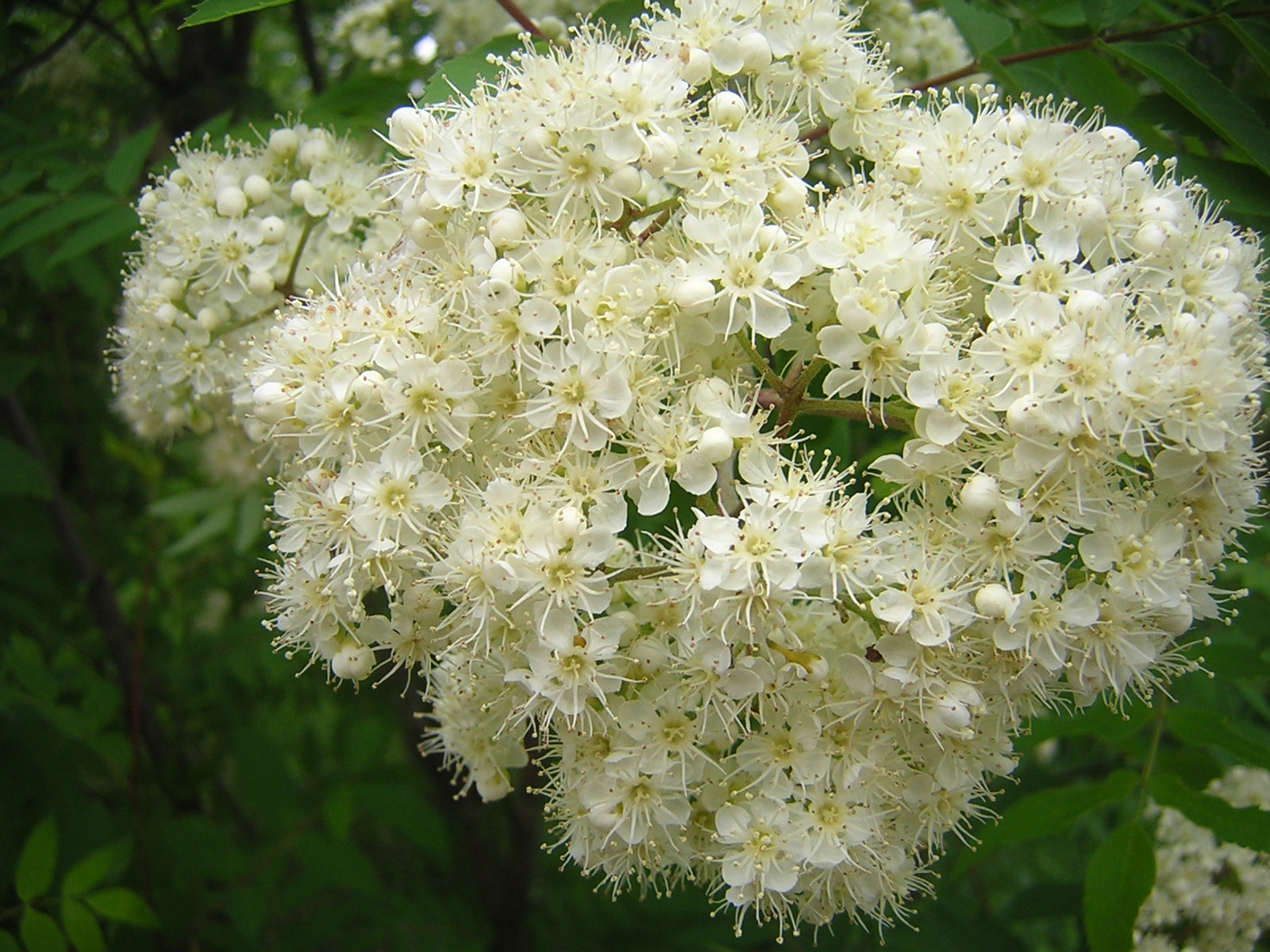 Рябина обыкновенная. Соцветие. - Sorbus aucuparia